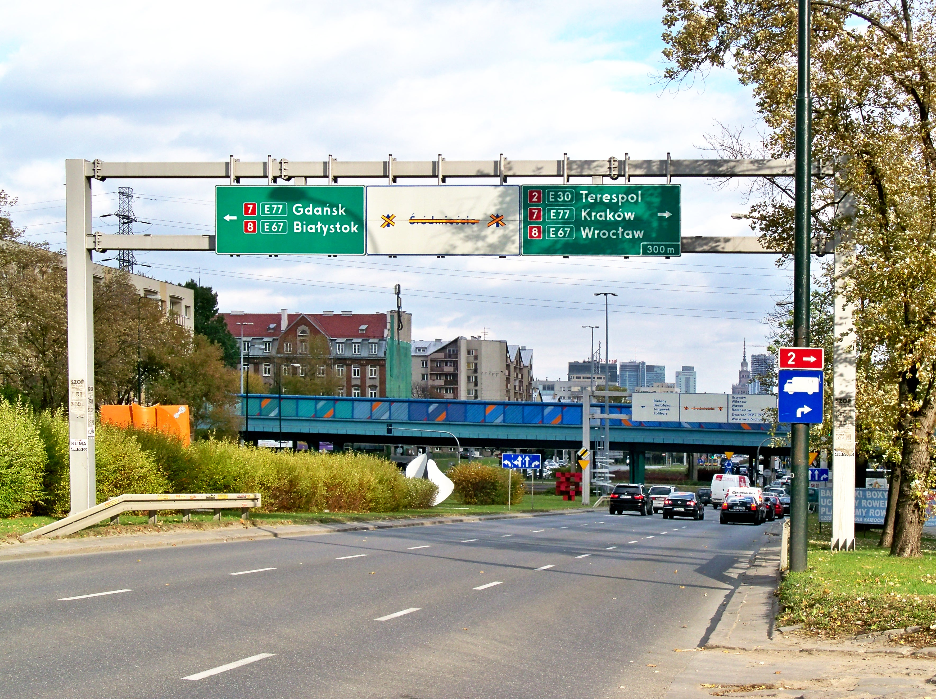 Ulica M. Kasprzaka w Warszawie przy rondzie Tybetu.